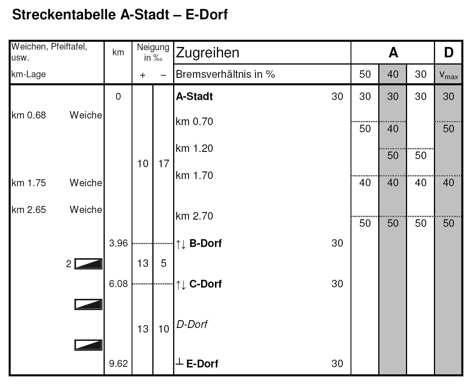 Streckentabelle einer fiktiven Strecke